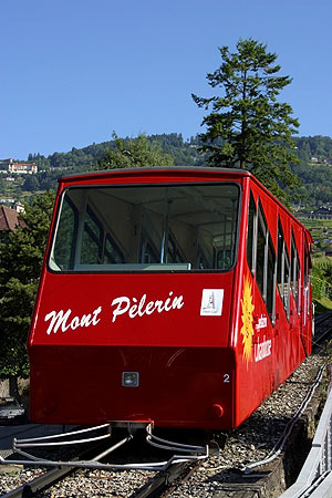 Standseilbahn Vevey-Mont Pèlerin